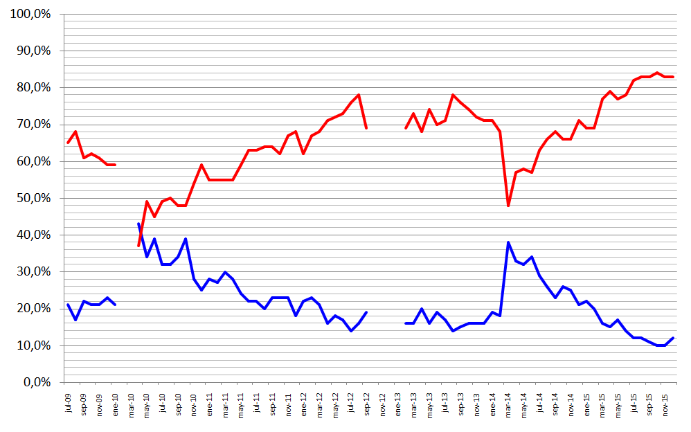 Porcentajes de aprobación (línea azul) y rechazo (línea roja) de la Cámara de Diputados de Chile. Información encuesta Adimark ( desde julio de 2009 en adelante.